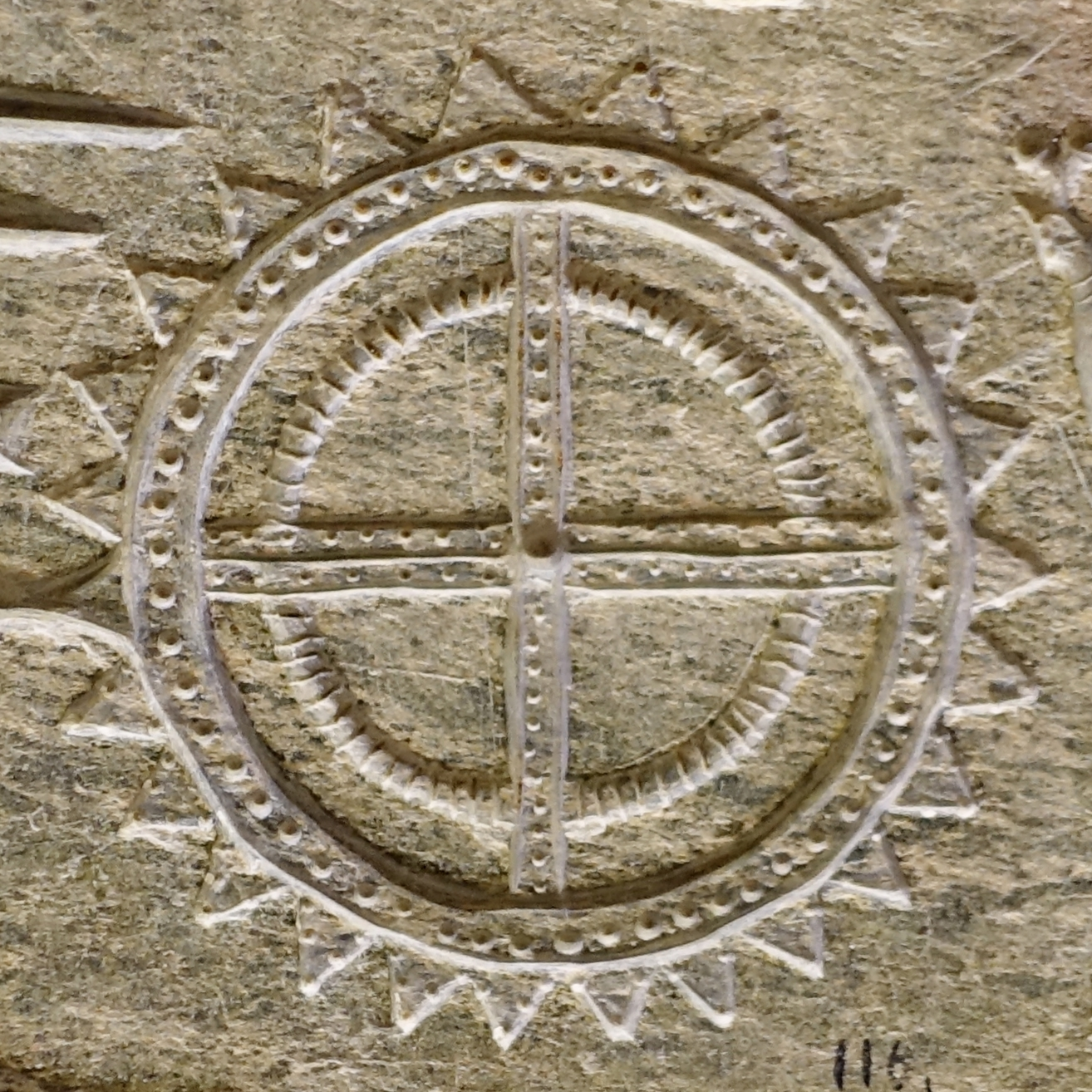 Strahlenträgerscheibe auf einer Schieferform zum Gießen von Kultfiguren und Symbolen, gefunden nahe dem Weiler Agia Triada an der Straße von Palekastro nach Sitia (1370–1200 v. Chr.), Archäologisches Museum von Iraklio, Kreta, Griechenland